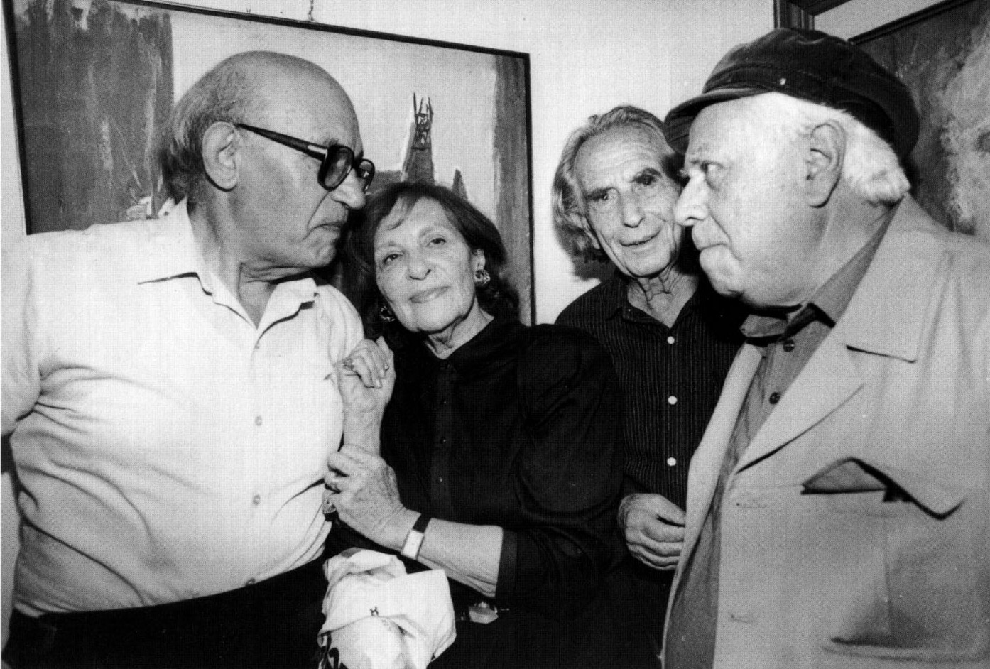 פתיחת התערוכה במשכן לאמנות, חולון, 1988. משמאל: דויד גלעדי, נתה קפלן, יחיאל שטריימן ואפרים ליפשיץ.